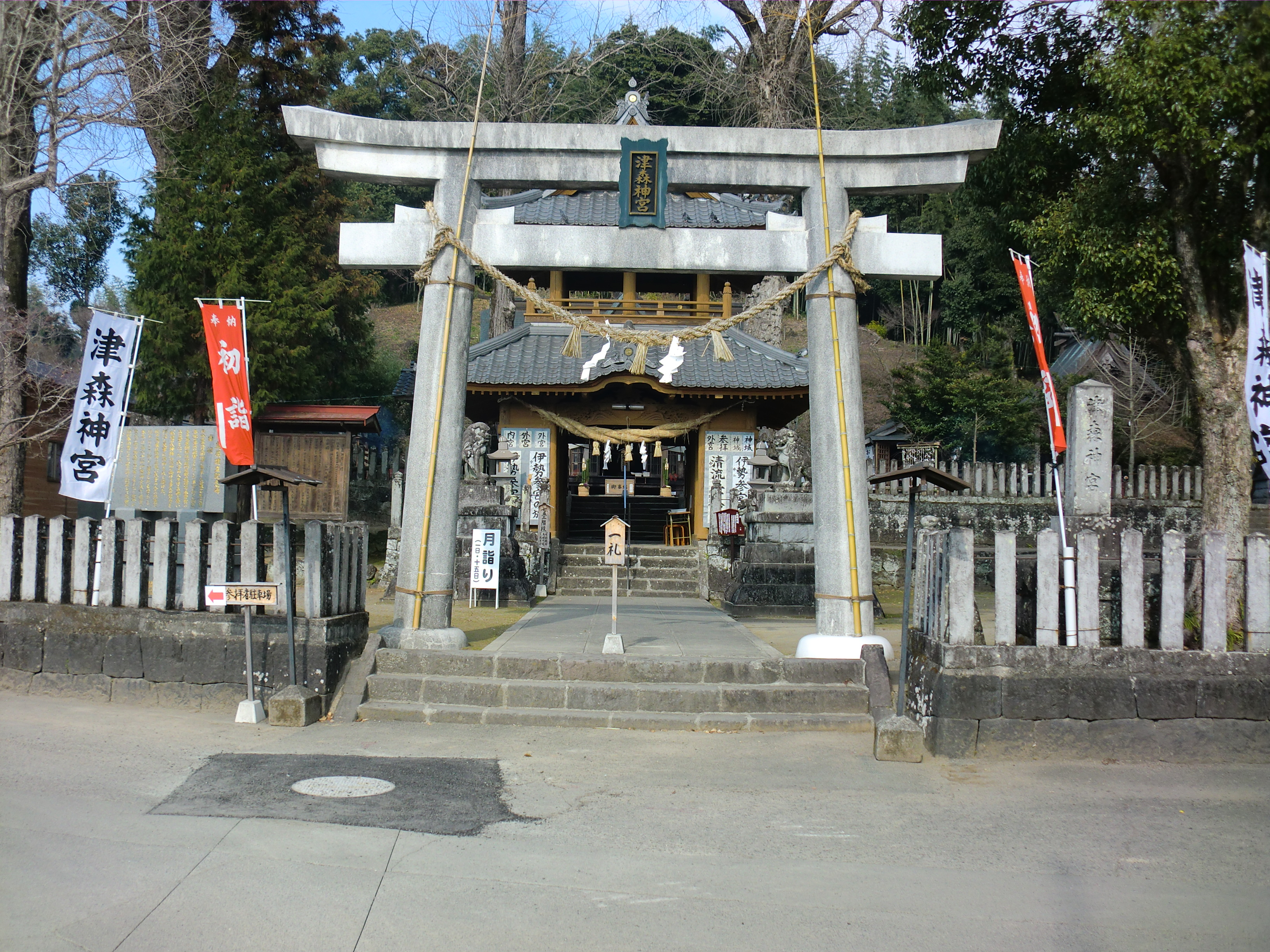 熊本県上益城郡益城町にある津森（つもり）神宮